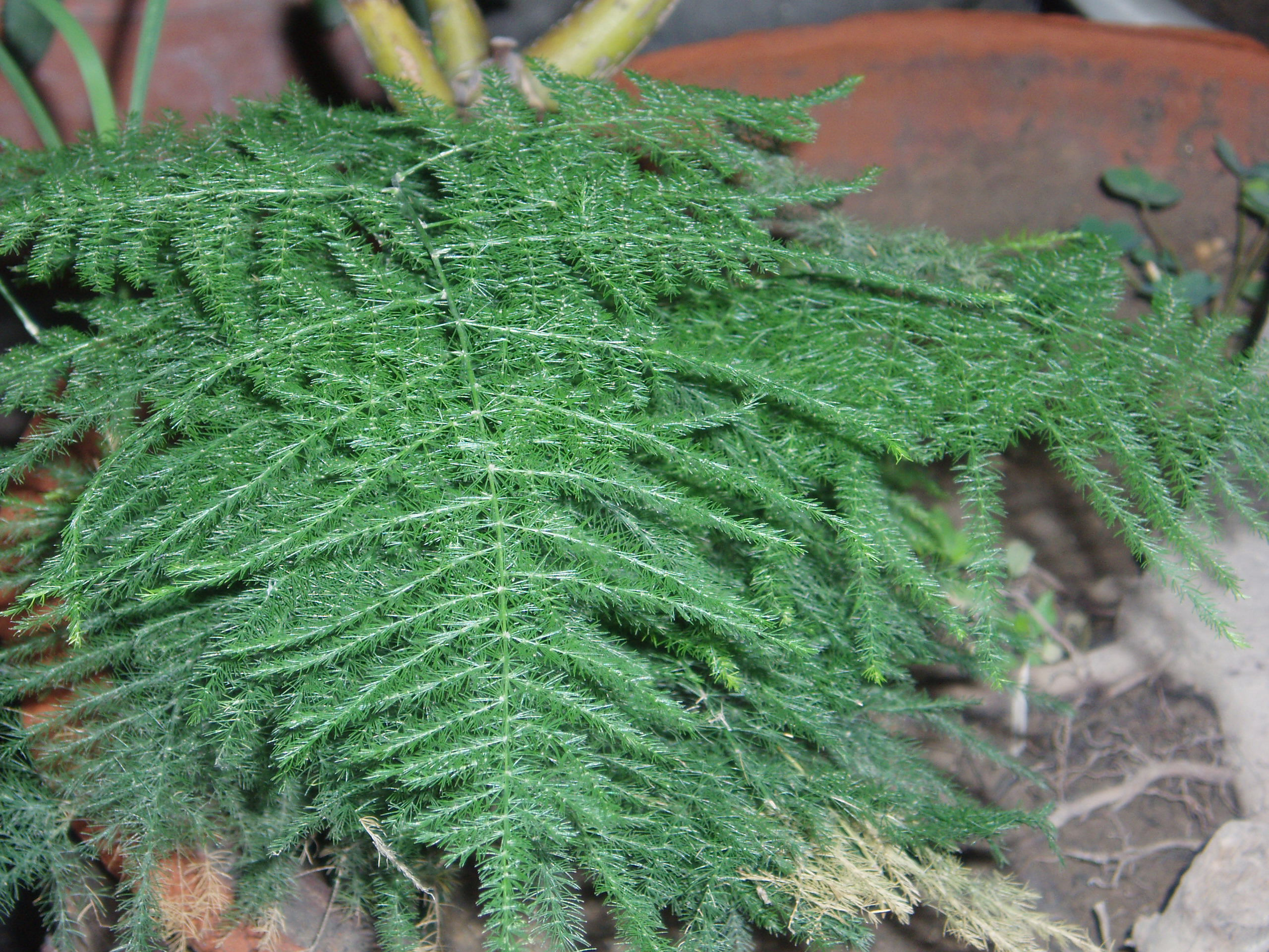 Emerald fern